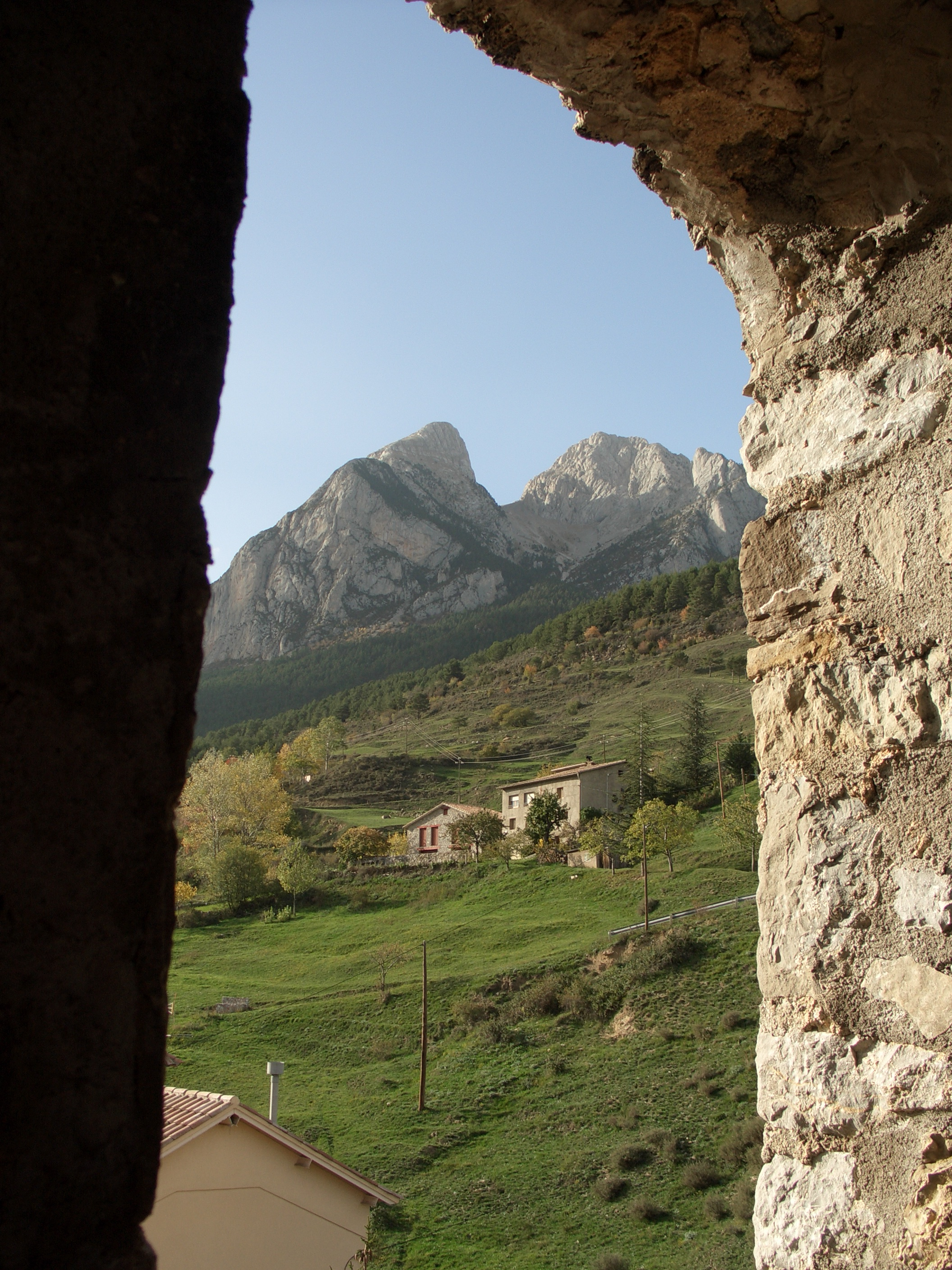 Pedraforca des del campanar de Saldes